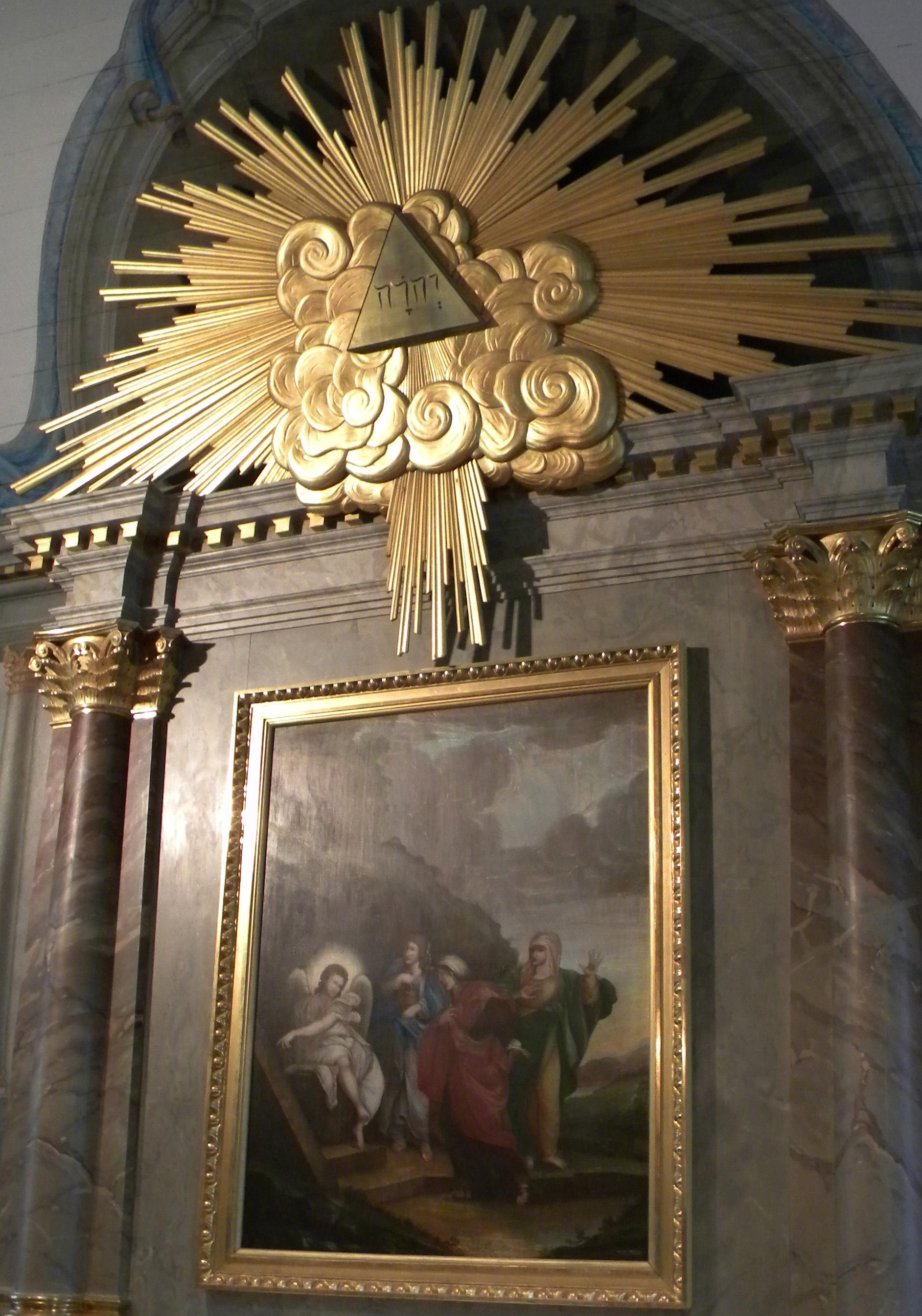 Altarkrön med tetragrammet JHWH i Fors kyrka